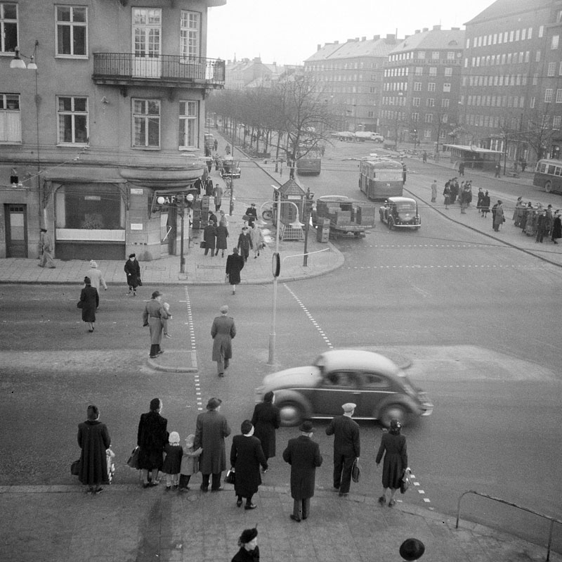 Korsningen Götgatan-Ringvägen 1950